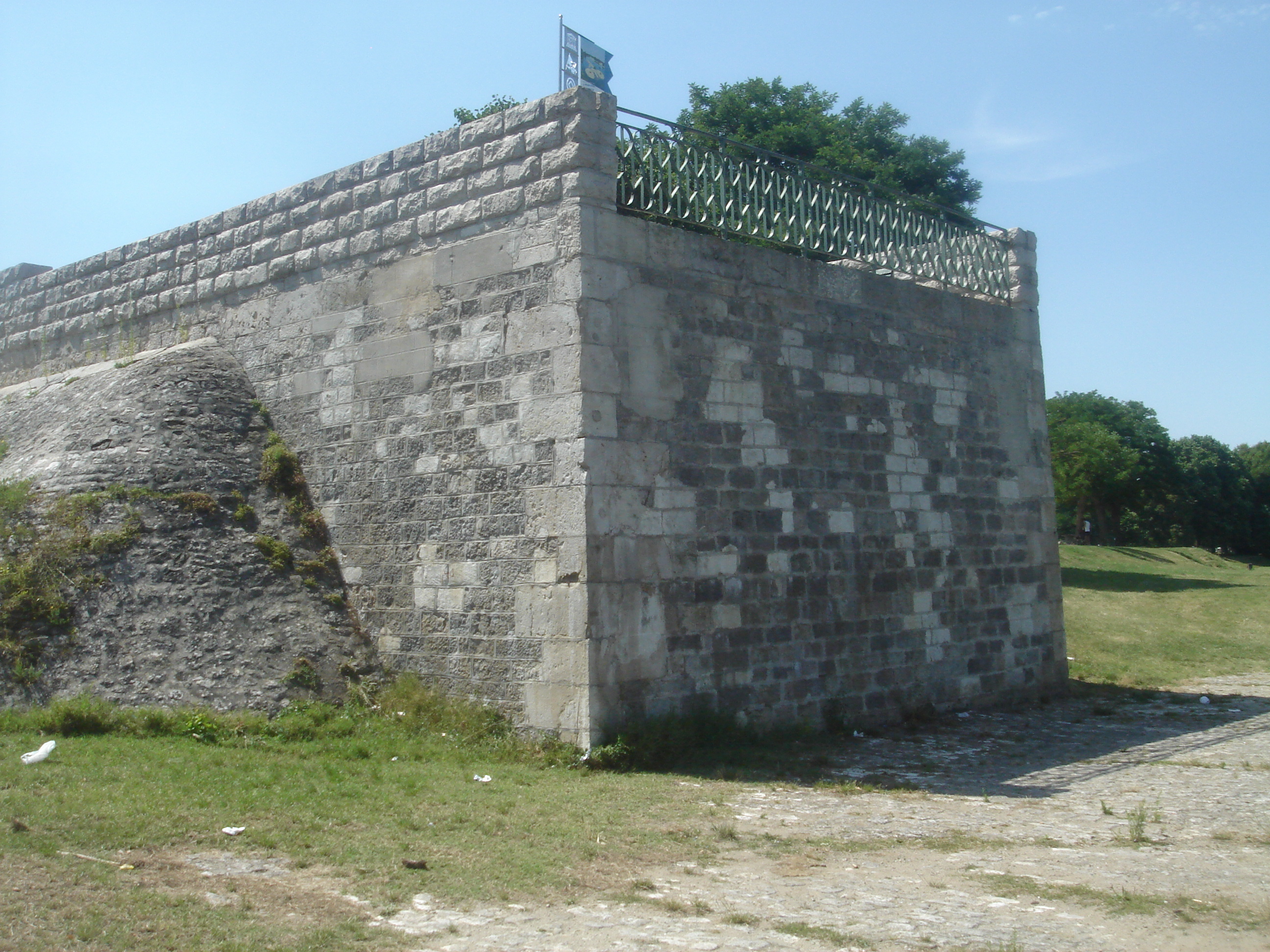 Culée de l'ancien pont suspendu, Jargeau, Loiret, France